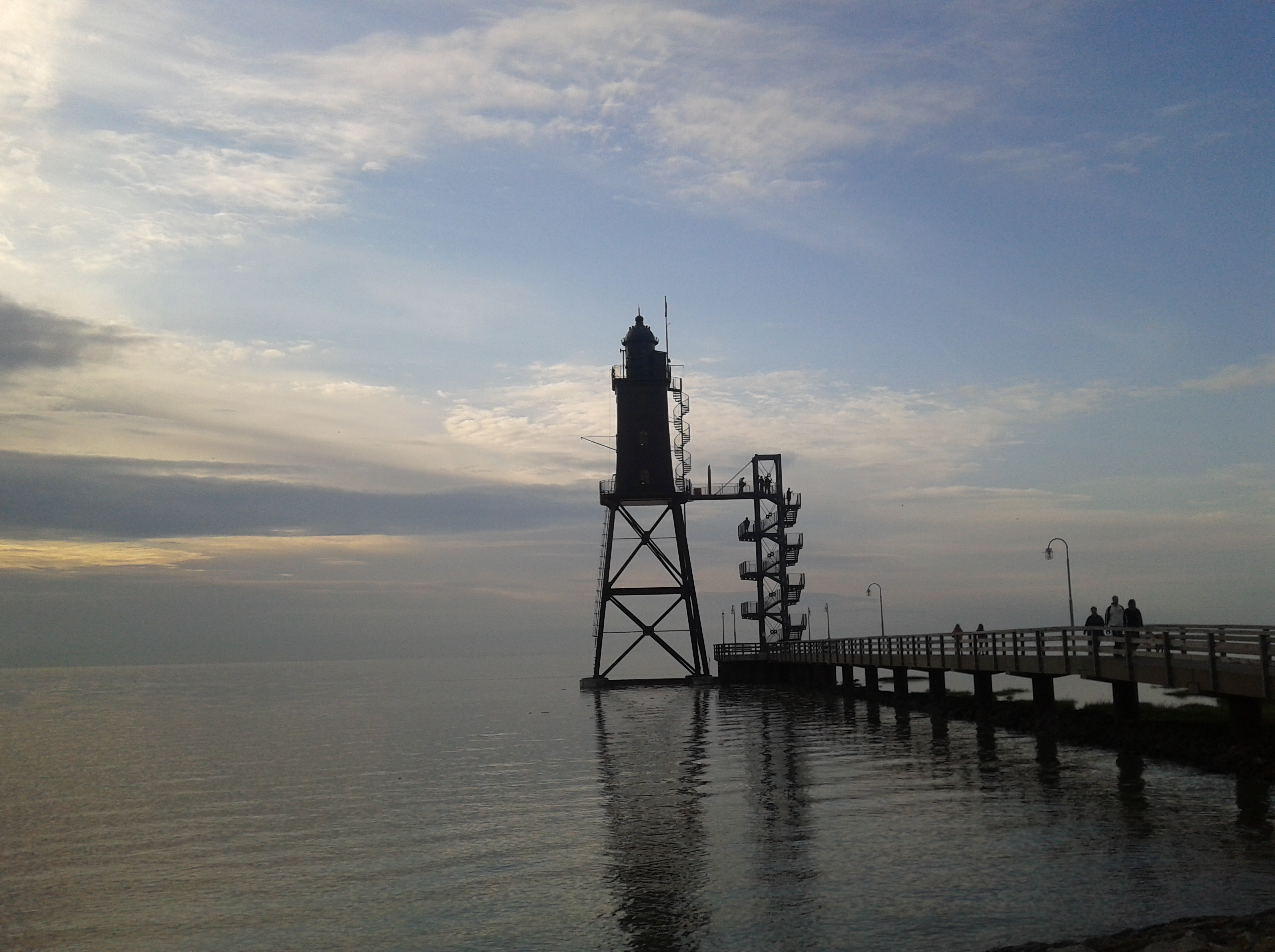 Leuchtturm Obereversand, Dorum-Neufeld (Germany)